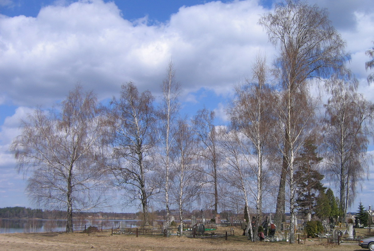 Autoriaus nuotrauka, 2006.04.22. Pabezninkų kapinaitės. Už jų matosi Pabezninkų ežeras. Nuotrauka gali būti platinama pagal GFDL licenciją.